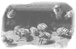 Honigbienen am Flugloch ihres Stockes